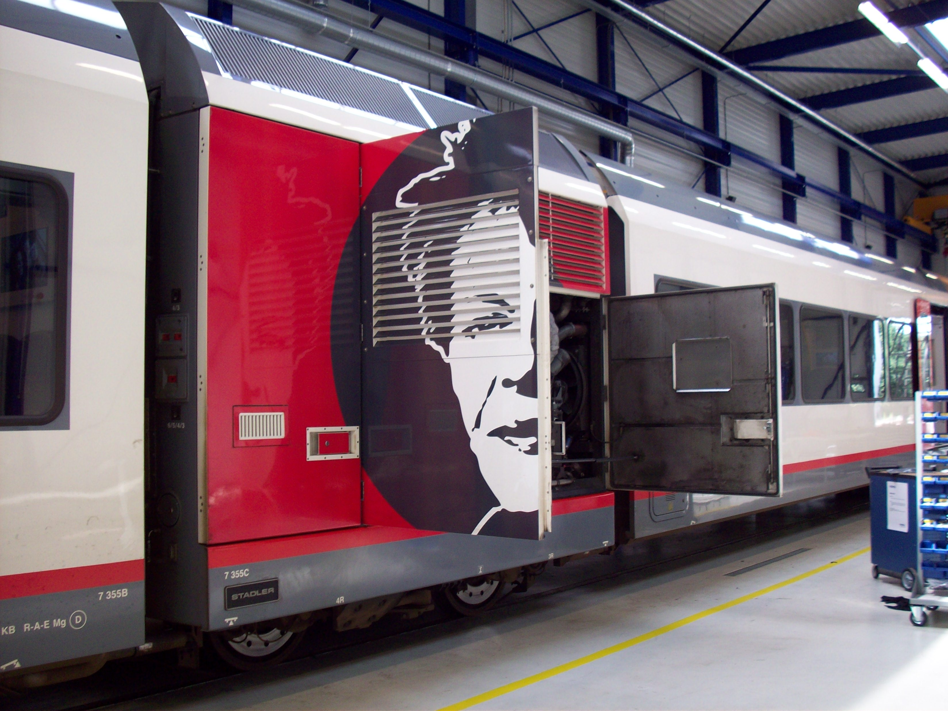 Velios GTW